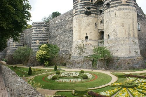 castle